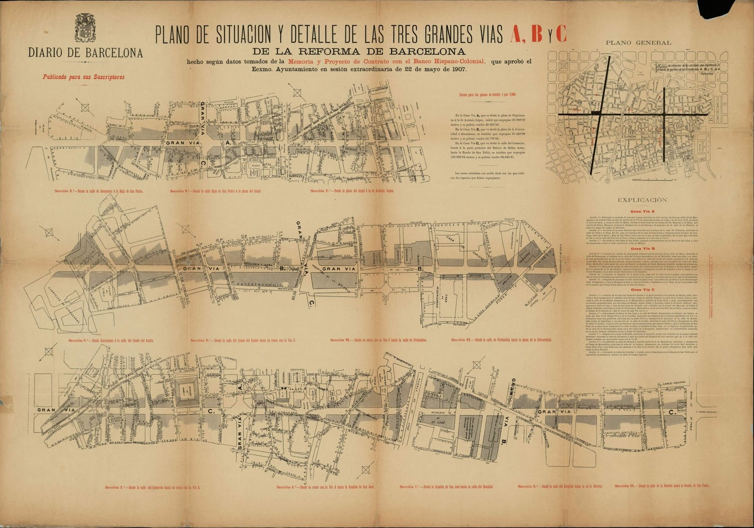 Plano de situación y detalle de las tres grandes vías A, B y C, Diario de Barcelona, 1907.